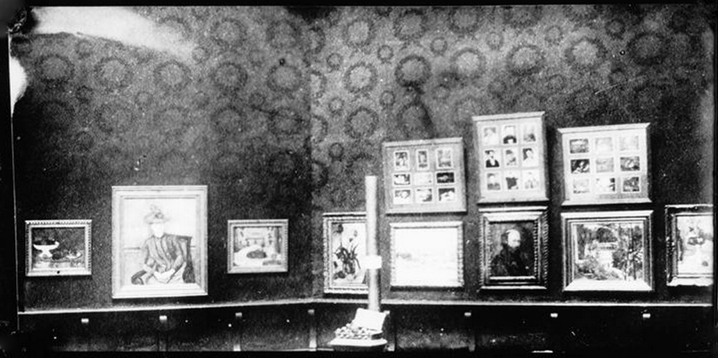 Vue de l'exposition du Salon d'Automne de 1904, salle Cézanne (Pommes et gâteaux, Mme Cézanne au chapeau vert, le plat de pommes, le vase de tulipes...), Paris, Musée d'Orsay